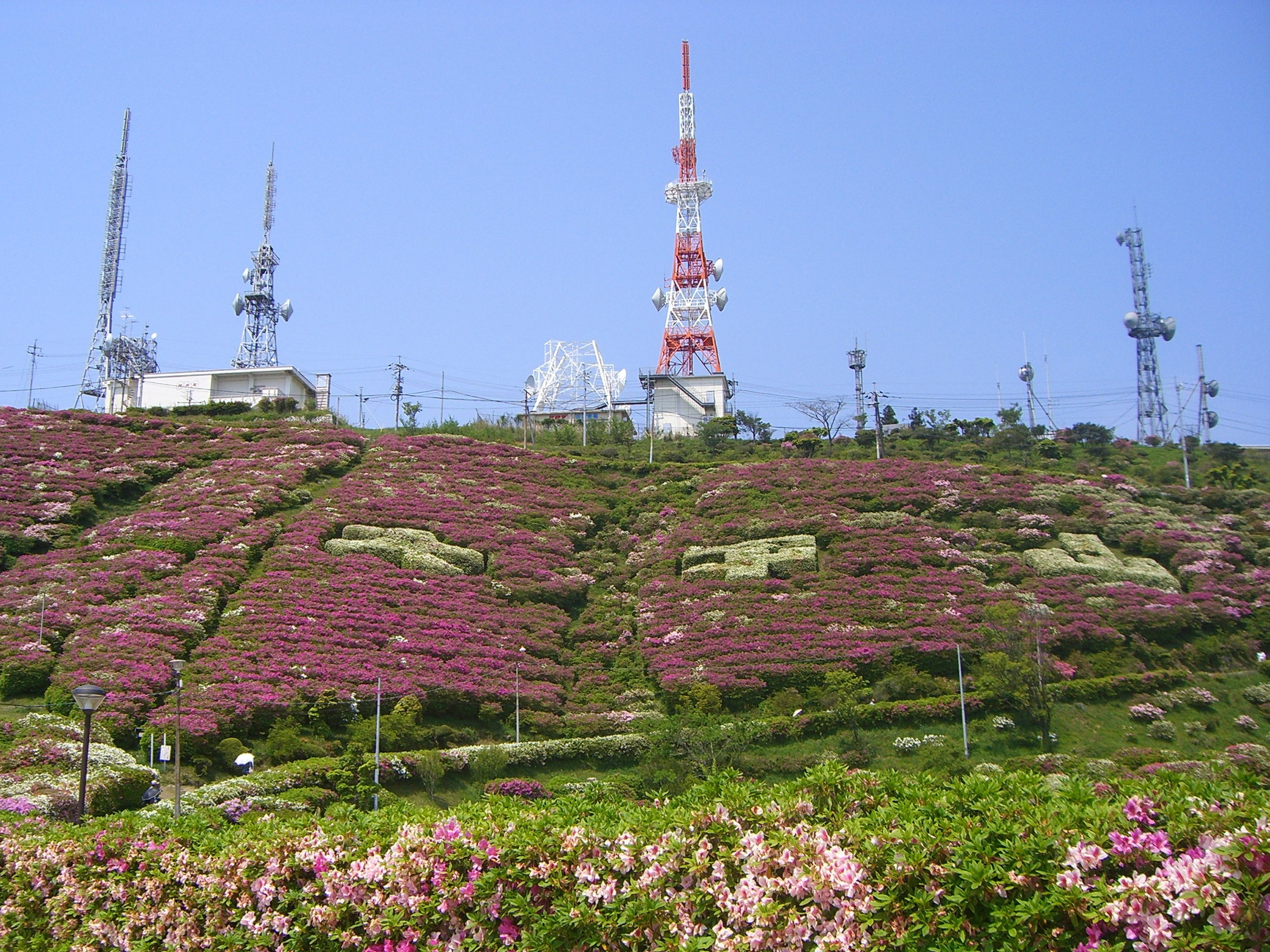 防府市大平山の山頂付近の様子